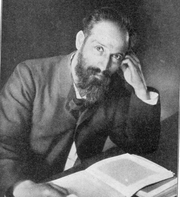 Foto uit boek van Ligthart "In Zweden" 1916